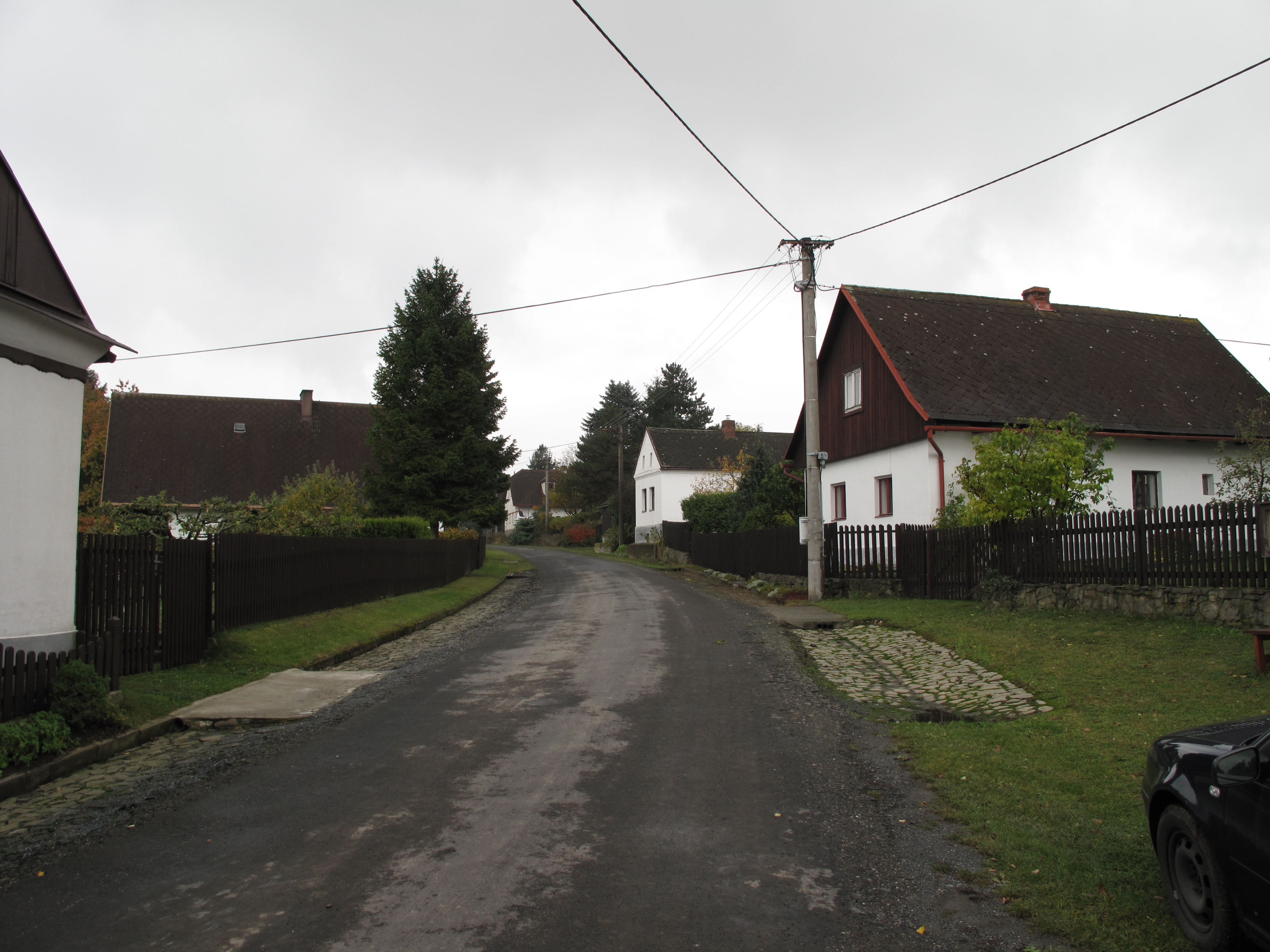 Piskořov. Okres Bruntál, Česká republika.